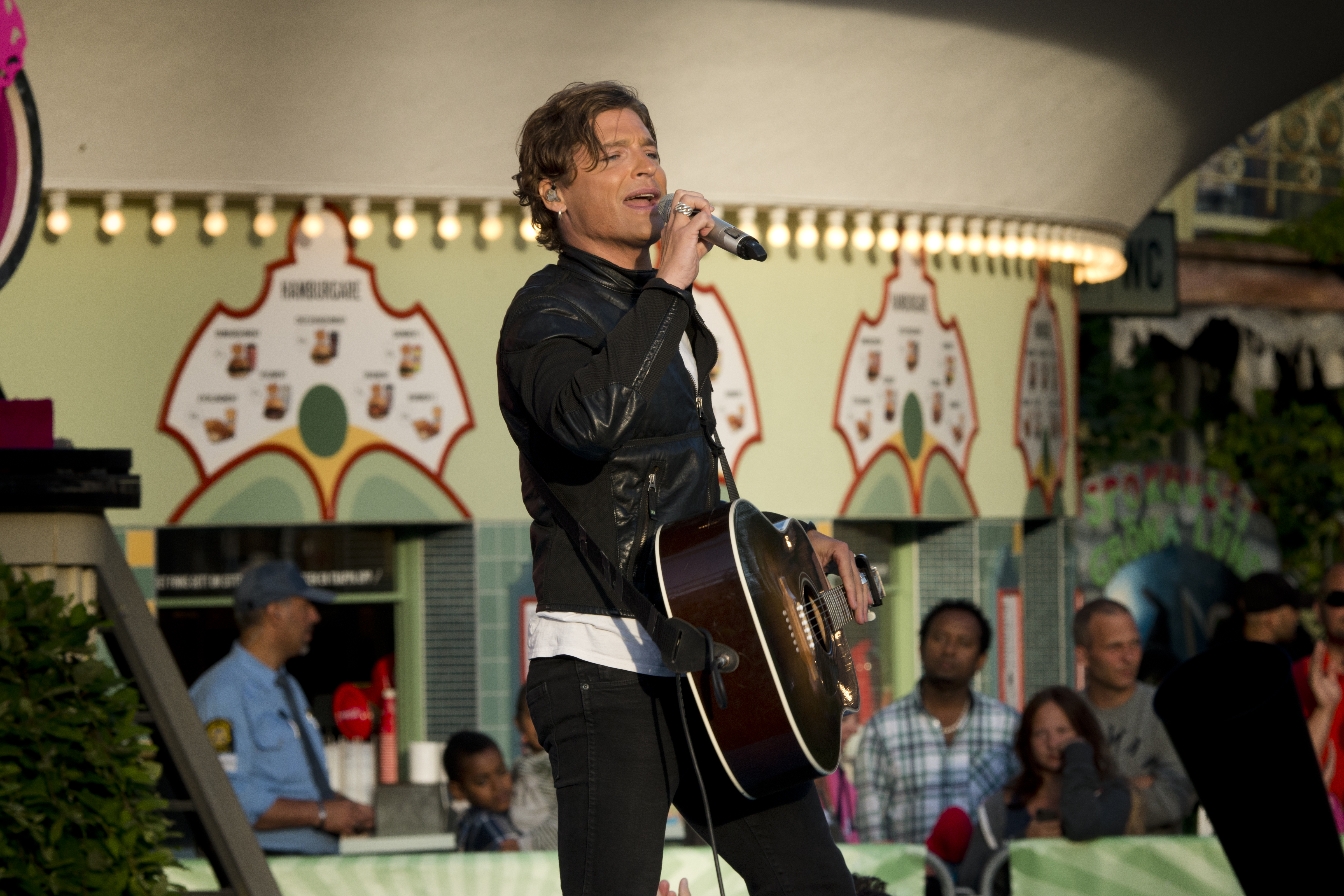 Andreas Johnson besöker Sommarkrysset i Stockholm, Gröna Lund